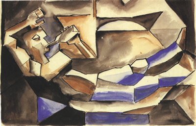 Trinker